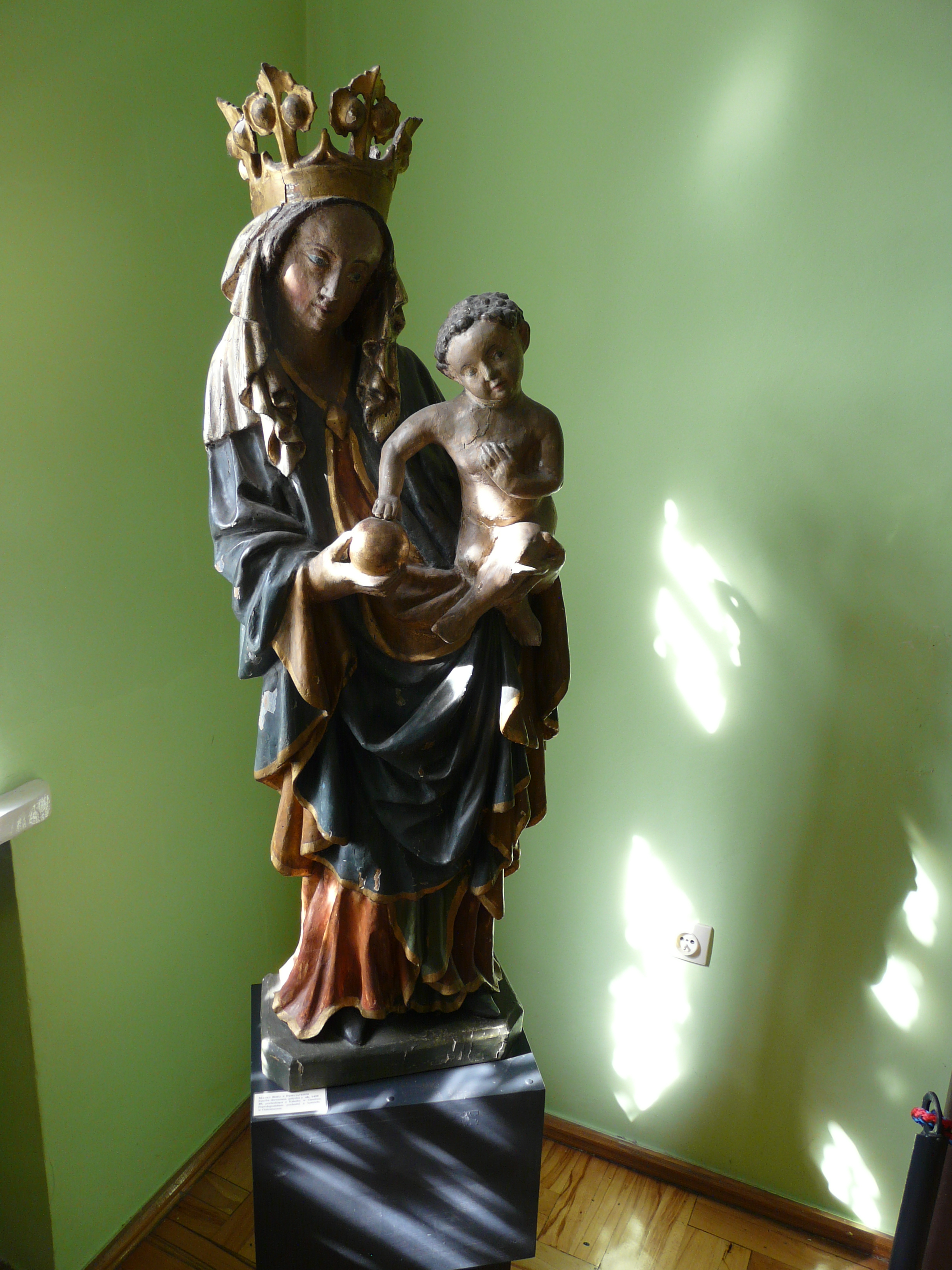 Museum of Archdiocese in Gniezno Matka Boża z Dzieciątkiem. Rzeźba drewniana, gotycka, z ok. 1420-1430 r. Pochodzi z katedry w Gnieźnie. Prawdopodobnie pochodzi z kościoła w Gościeszynie.